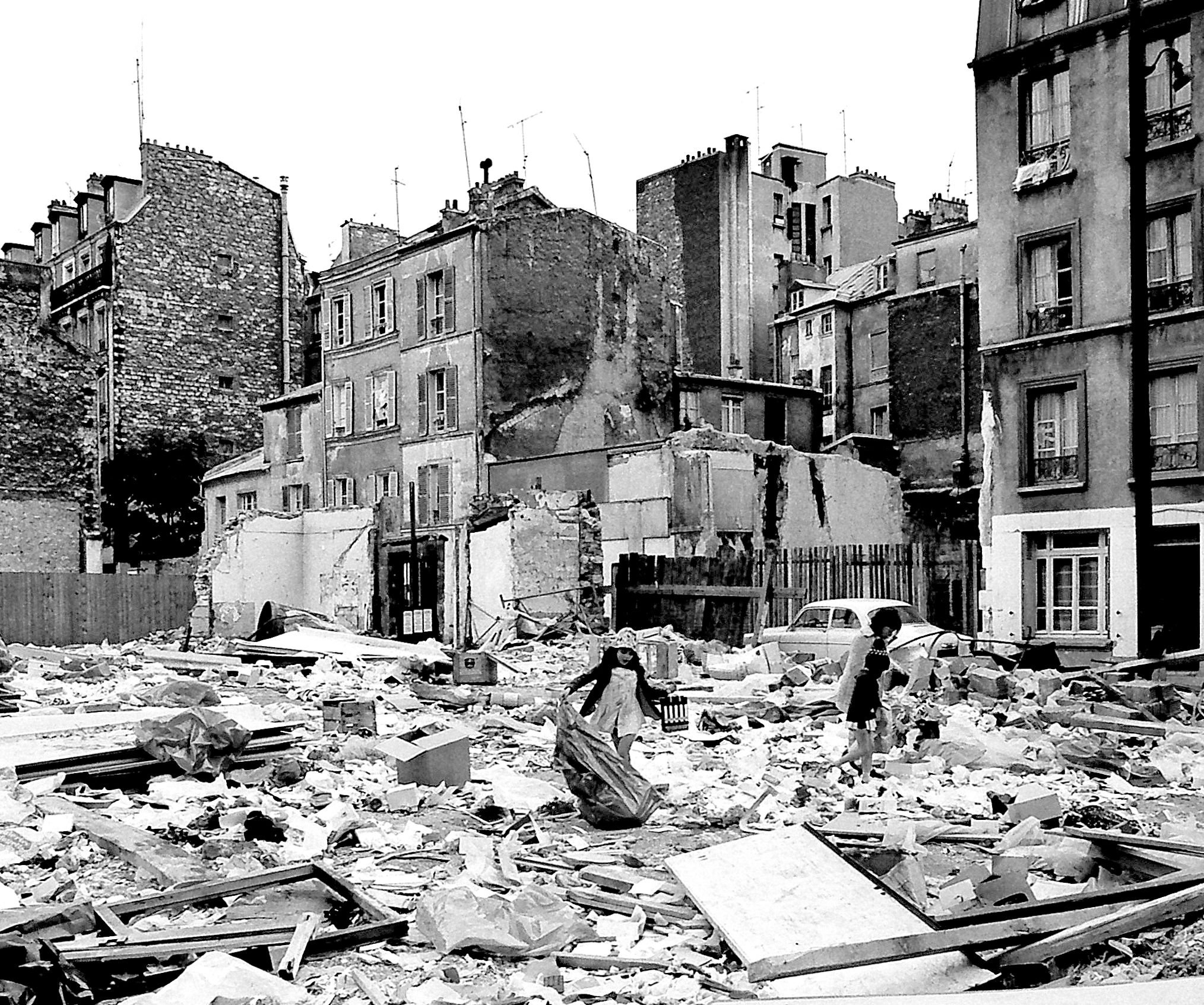 Paris - Destruction de Montparnasse.